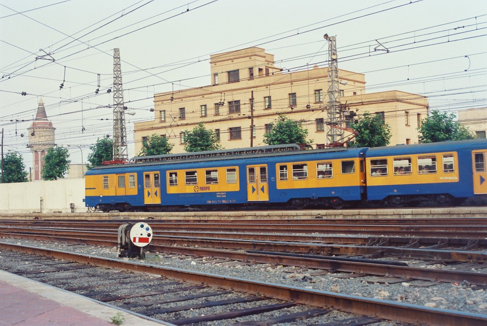 La 436-026-9 en Barcelona-Término